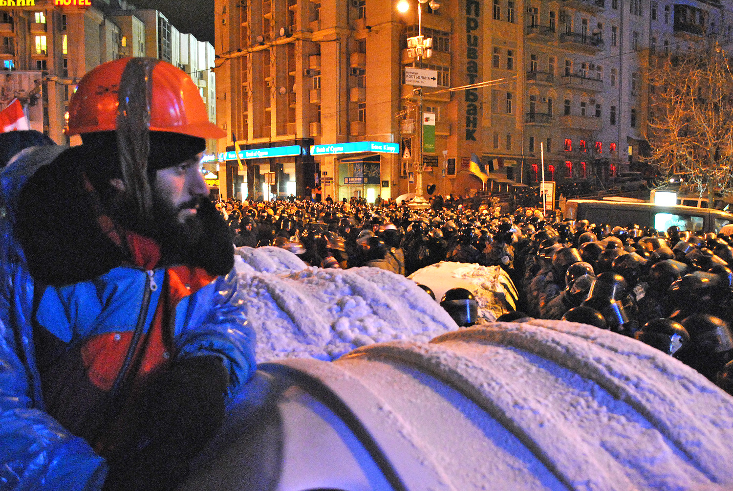 Герой Небесної сотні Сергій Нігоян на барикаді на вулиці Михайлівській біля Будинку профспілок у ніч штурму Майдану 11 грудня 2013 року.